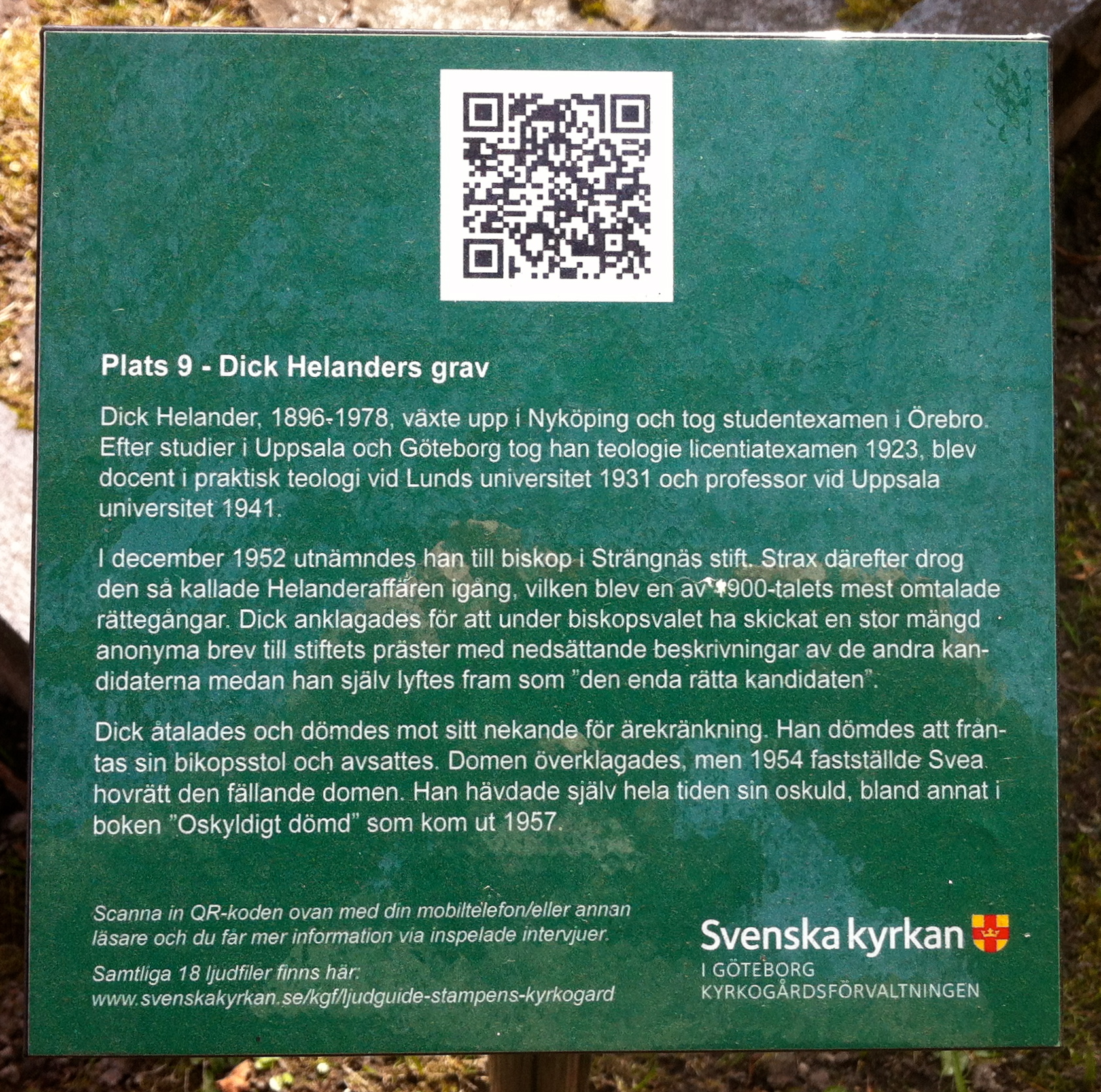 Text vid Dick Helanders grav, Stampens kyrkogård i Göteborg. Kyrkogårdsförvaltningen vid Svenska kyrkan i Göteborg ansvarar för texten.